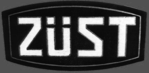 Logo der Firma Züst